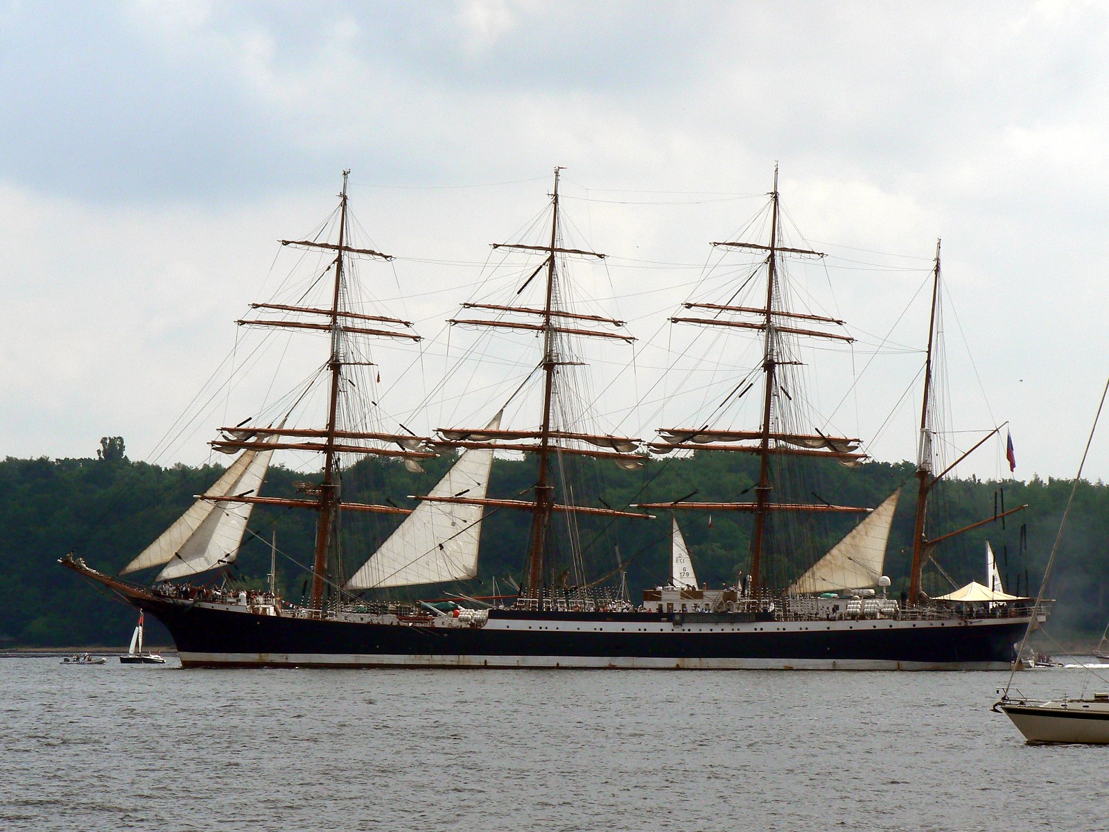 Segelschulschiff (Viermastbark) Sedow auf der Windjammerparade der Kieler Woche 2007. Der Rumpf ist noch in den Farben der Pamir gestrichen (für die Filmaufnahmen zum Fernsehfilm "Der Untergang der Pamir").